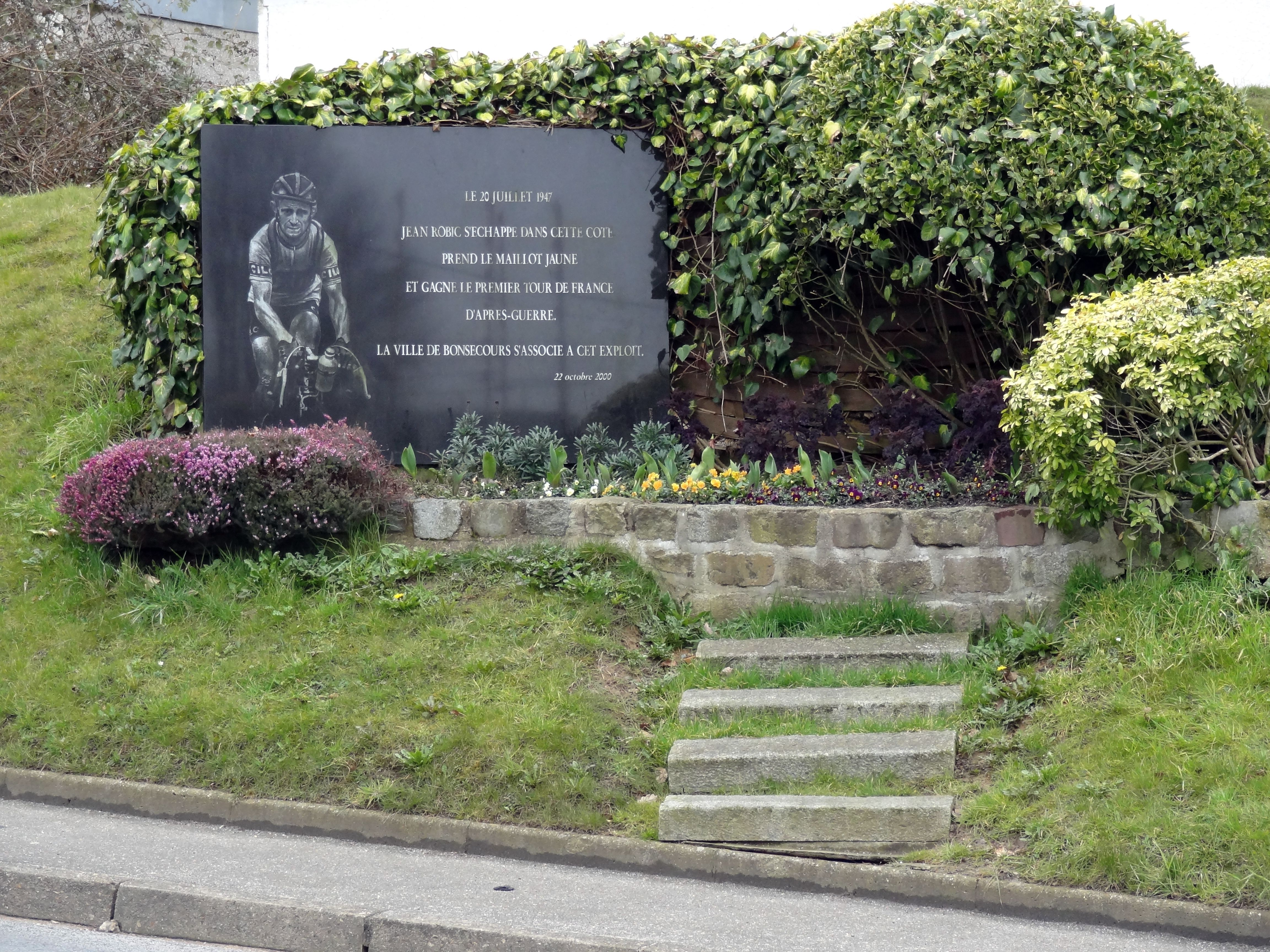 Stèle commémorative en haut de la côte de Bonsecours, en l'honneur de Jean Robic.